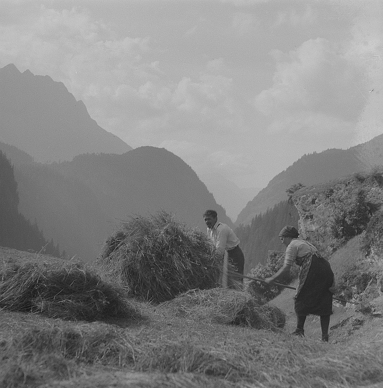 Original image description from the Deutsche Fotothek Bauernfamilie bei der Heuernte im Söldener Gebiet